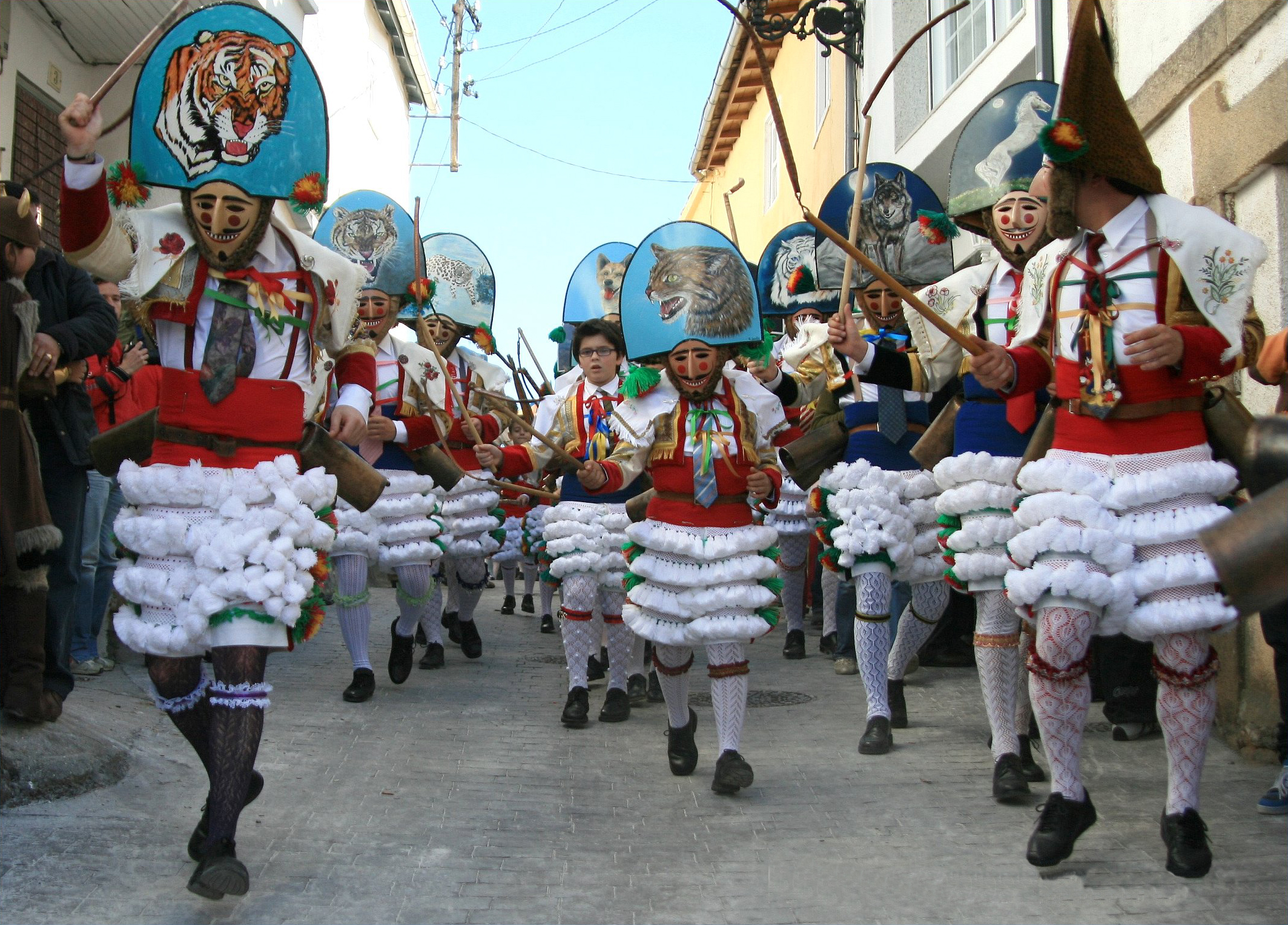 Peliqueiros de Laza, Galiza